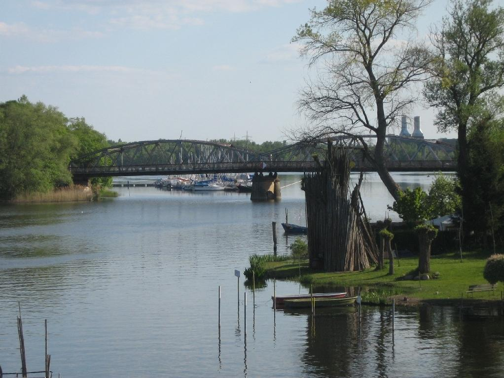 Die alte Brücke der Bundesstraße B1 über die Havel in Plaue bei Brandenburg an der Havel (Brandenburg, Germany)